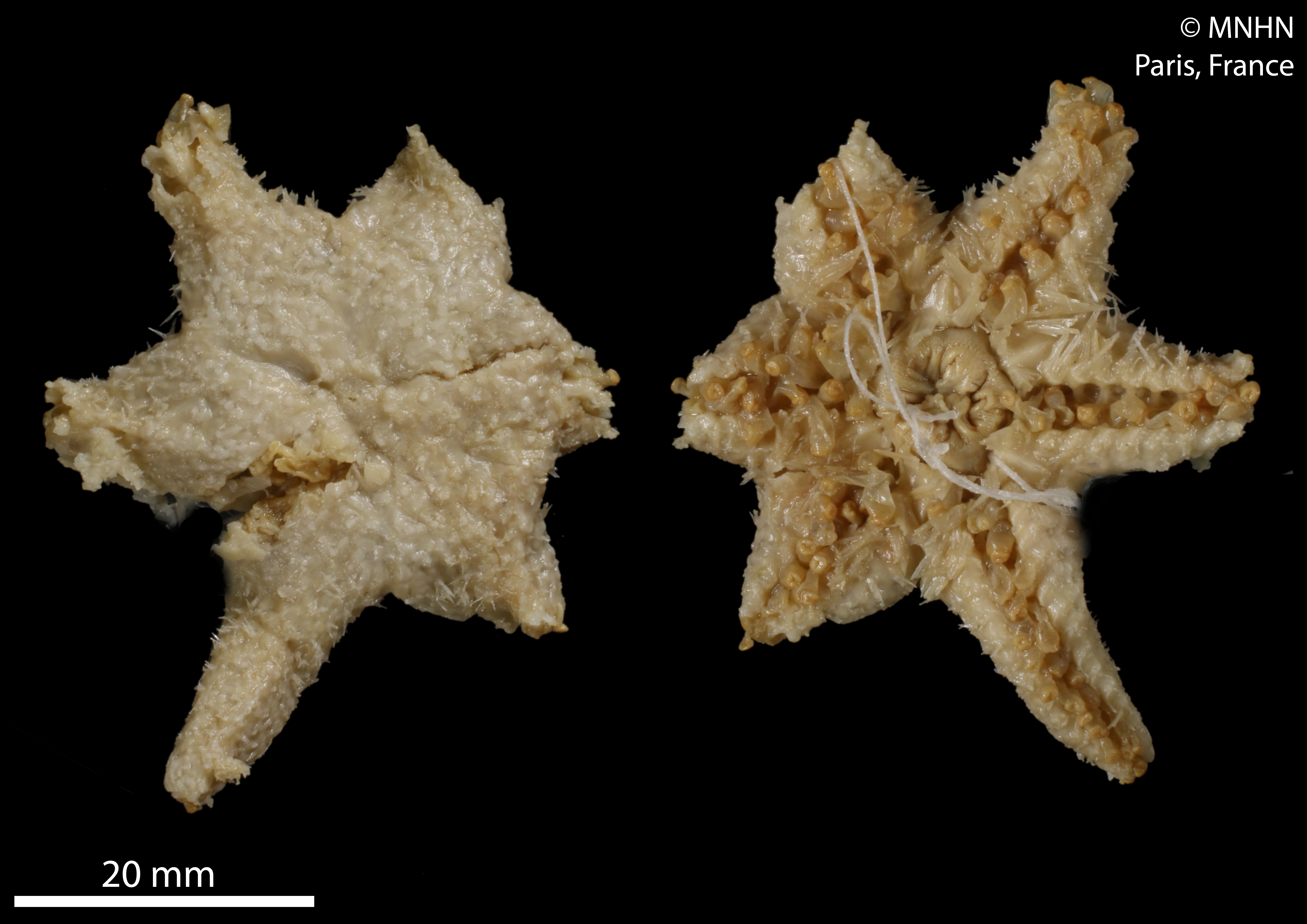 Myxaster perrieri, collection du Muséum National d'Histoire Naturelle (Paris, France). Origine : Libellé du pays : ATLANTIQUE Navire : Caudan Numéro de station : 15 Profondeur (mètres) : 1300